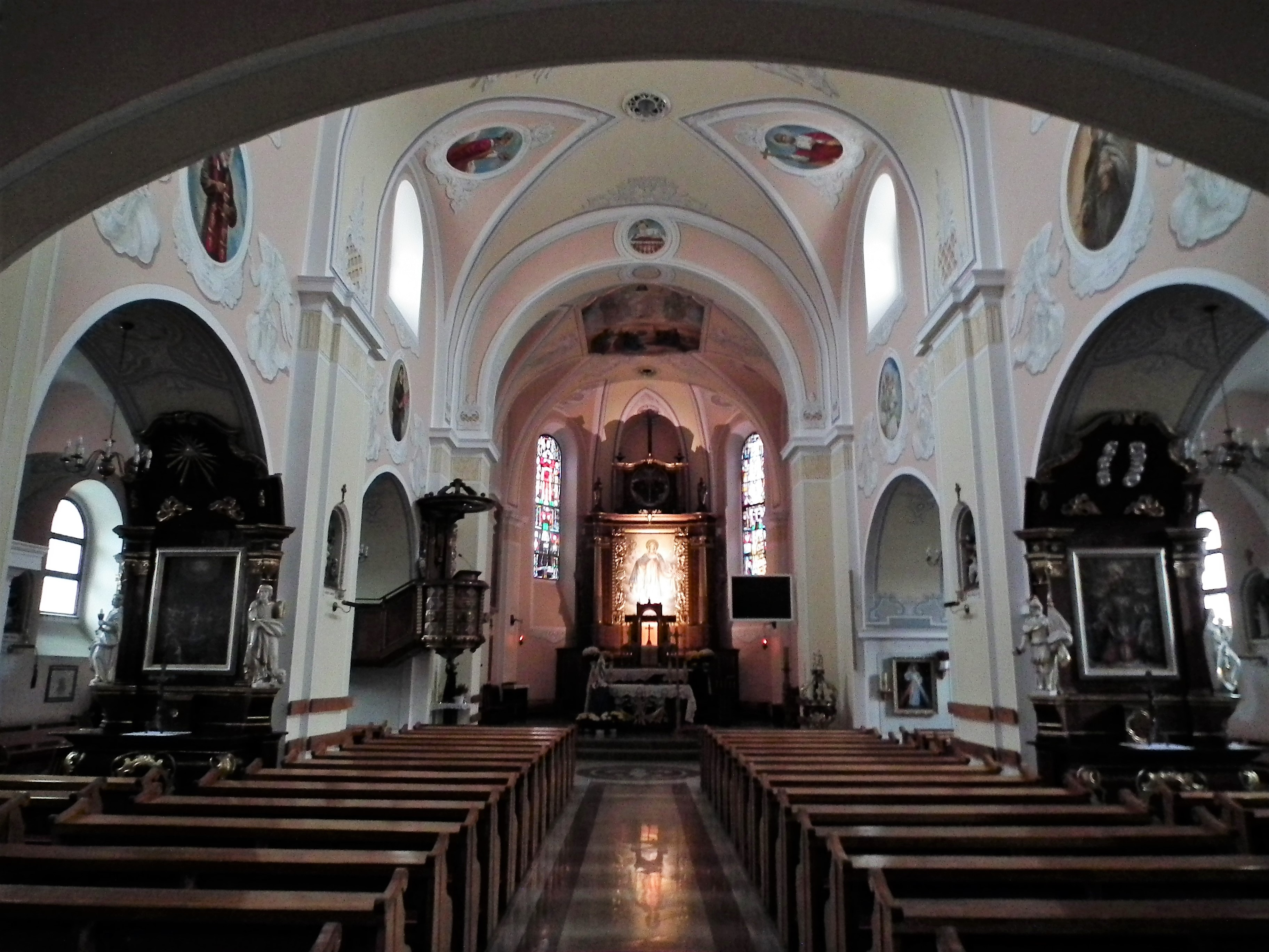 Kosciół w Grabowie n/Prosną.